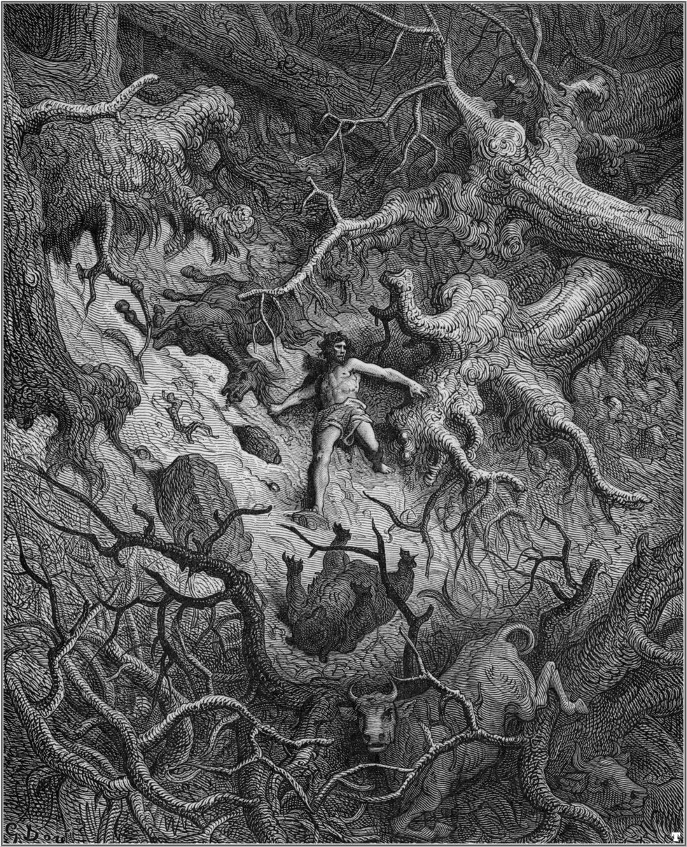 illustration of Ludovico Ariosto’s “Orlando Furioso”.